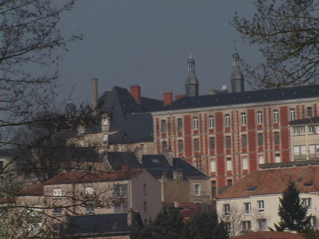 le collège Henri IV de Poitiers vu depuis la pont Saint- Cyprien